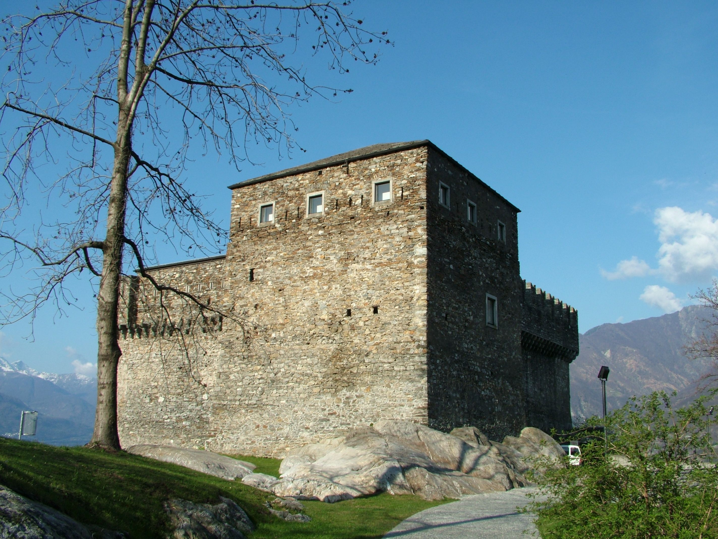 Bellinzona, Schweiz, Castelo die Sasso Corbaro, Aussenansicht